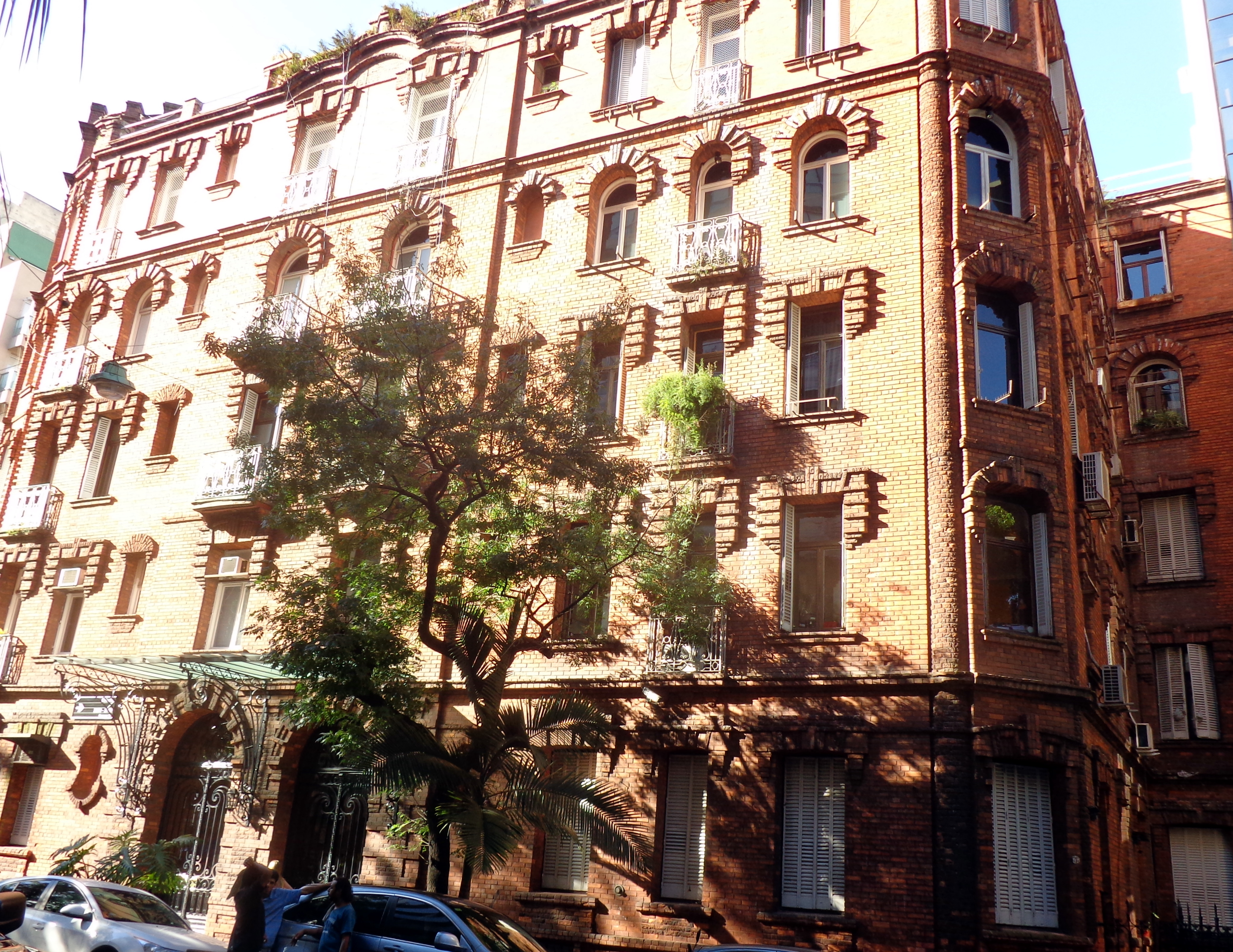 Fue proyectado y construido por el ingeniero-arquitecto británico Regis Pigeon en 1911. Se encuentra en la esquina del 3791 de la calle Cabello (con prolongación sobre la calle República Arabe Siria), barrio de Palermo, Buenos Aires, Argentina.